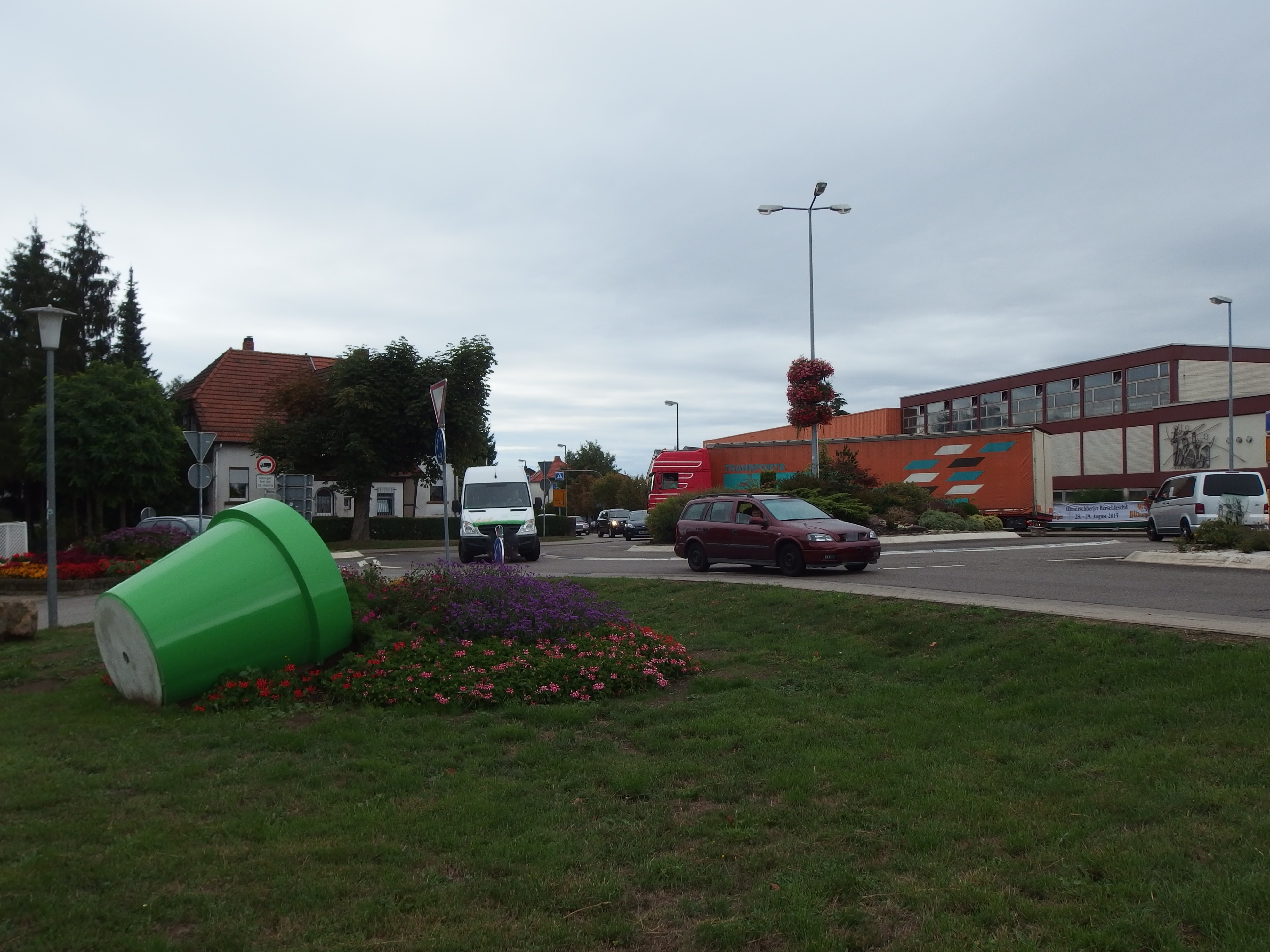 Früherer Standort der Kaiserlinde in Elversberg. Der umgestürzte Blumenkübel soll an die Nacht vom 30. auf den 31. März 2015 erinnern, als die Linde auf den nahen Kreisverkehr stürzte.